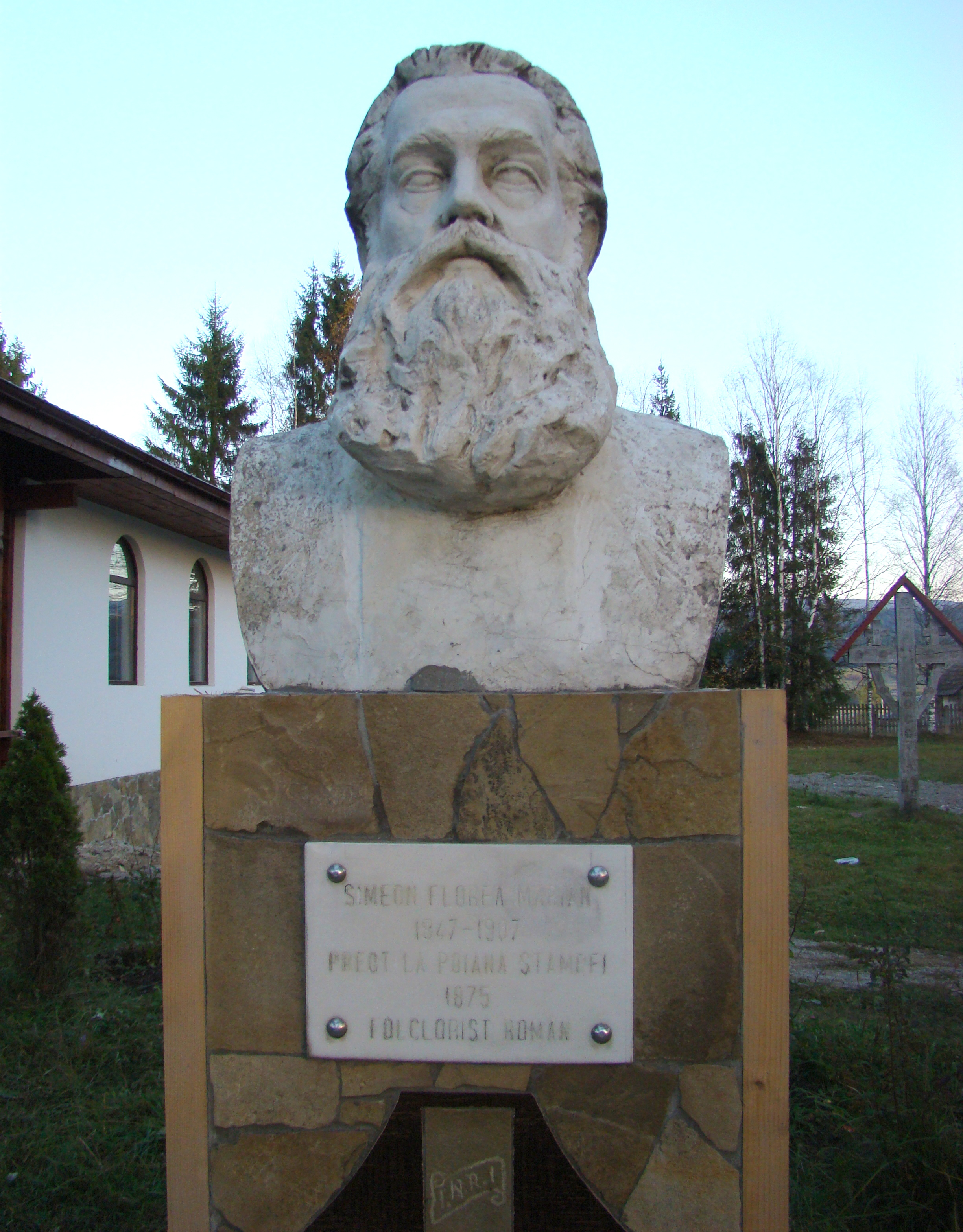 Biserica de lemn „Sfinții Arhangheli Mihail și Gavriil” din Poiana Stampei, județul Suceava (bustul preotului și folcloristului Simeon Florea)